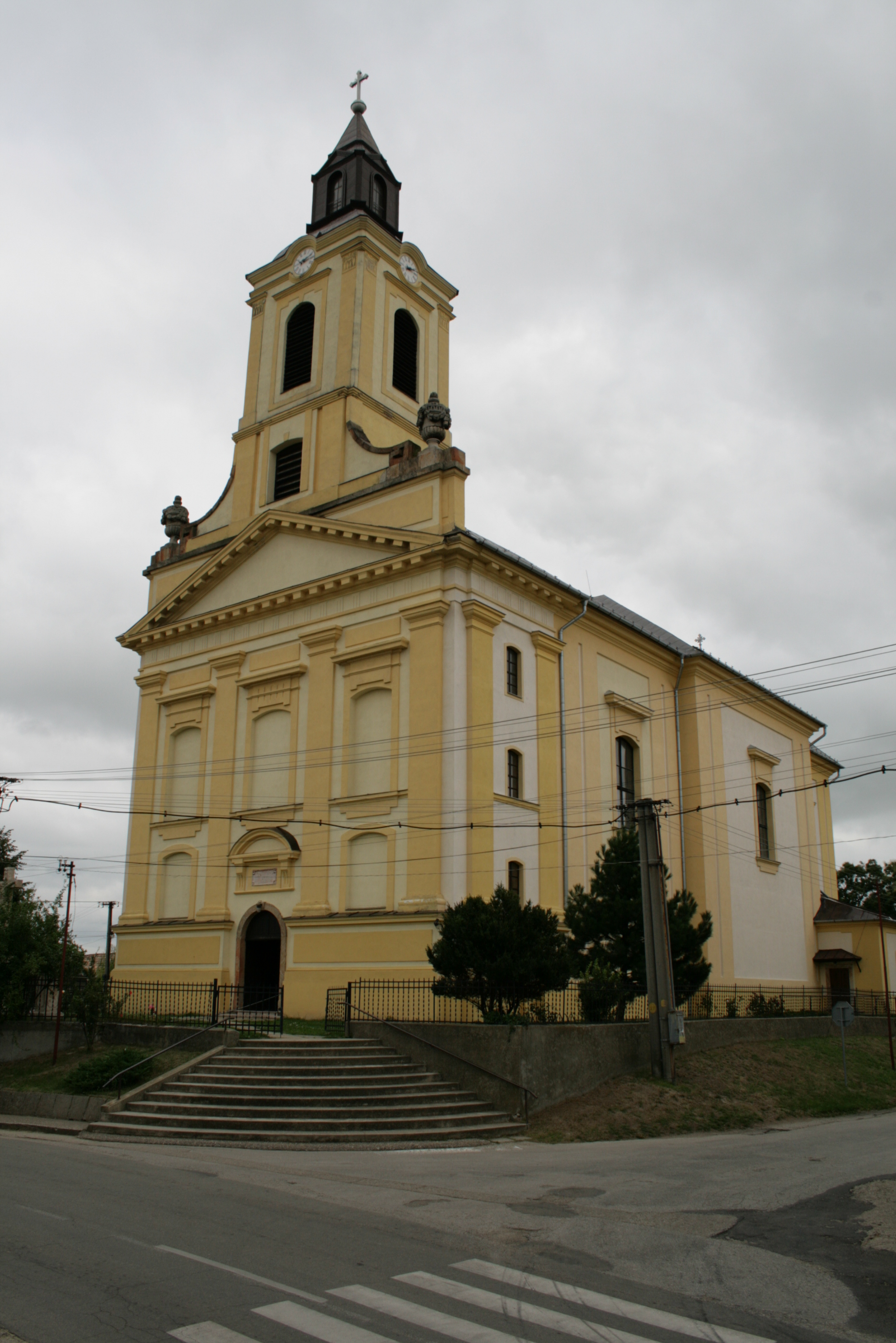 Temple at Svodín (Slovakia)